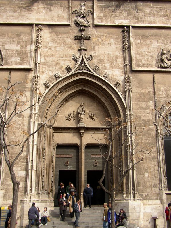 Valencia (Comunidad Valenciana), España. Valencia. Lonja. Fotografía realizada el 22 febrero de 2003 por el autor Usuario. Pelayo2.